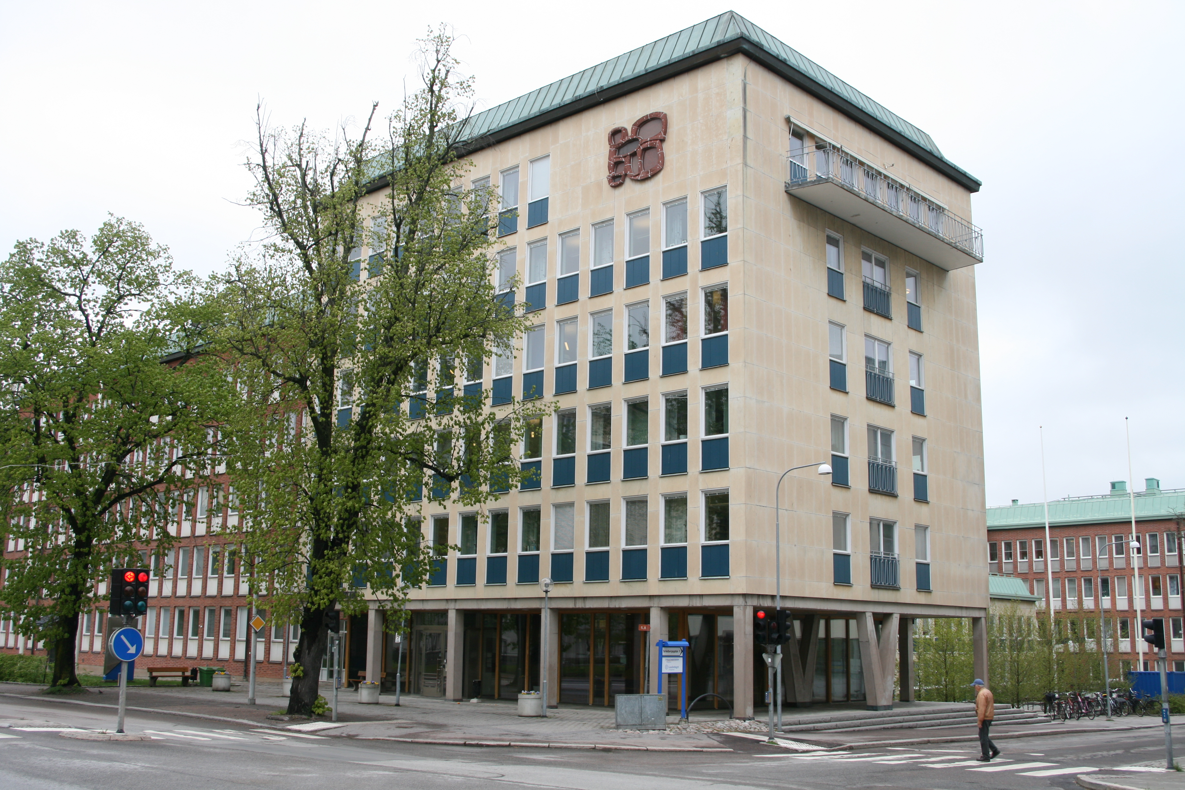 Landstingshuset, Linköping, från sydväst